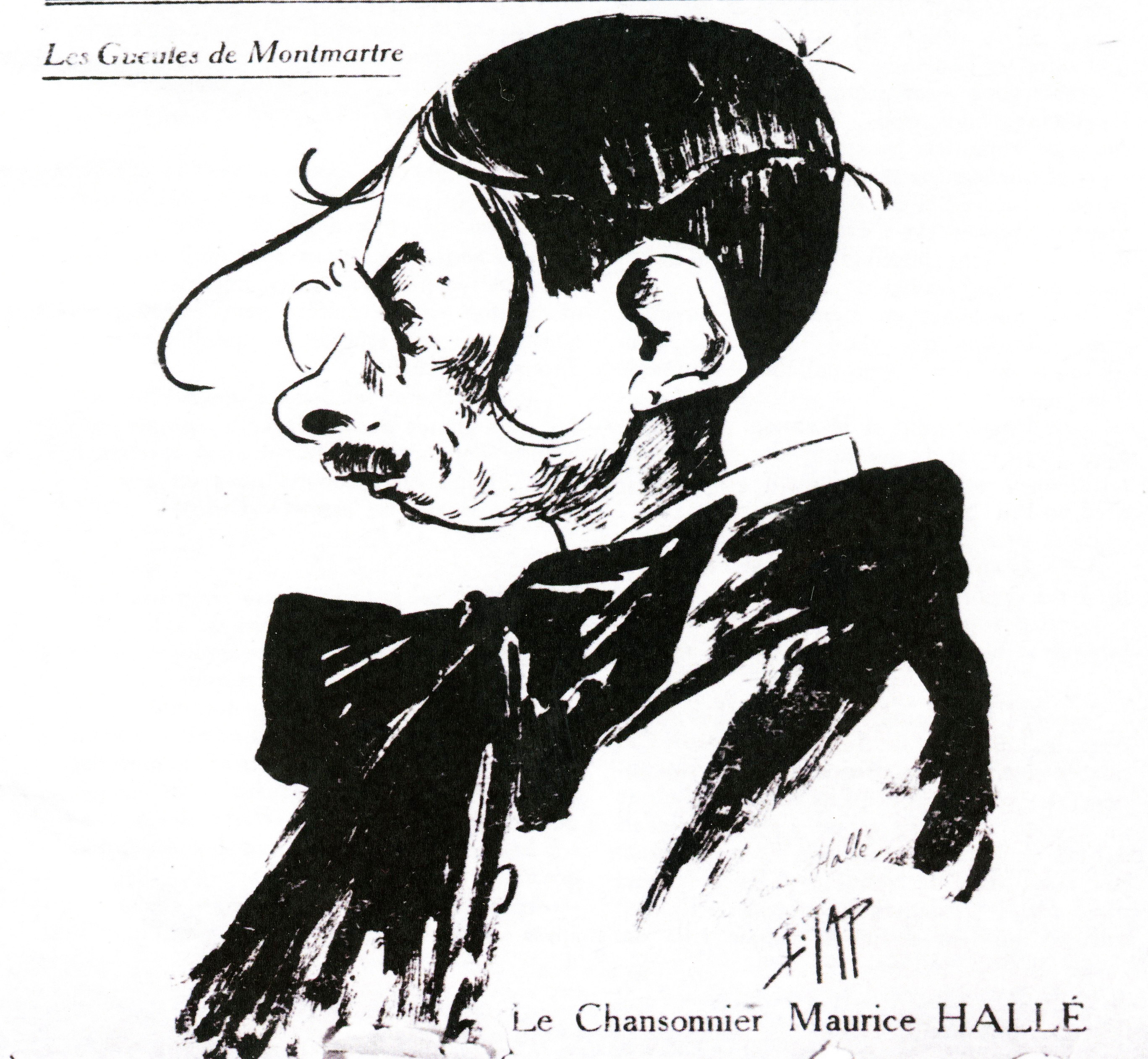 Dessin de E.Lapp dans la Vache enragée